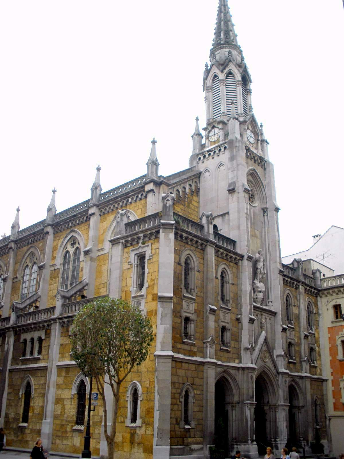 Iglesia del Sagrado Corazón de Jesús (Jesuitas), en Oviedo